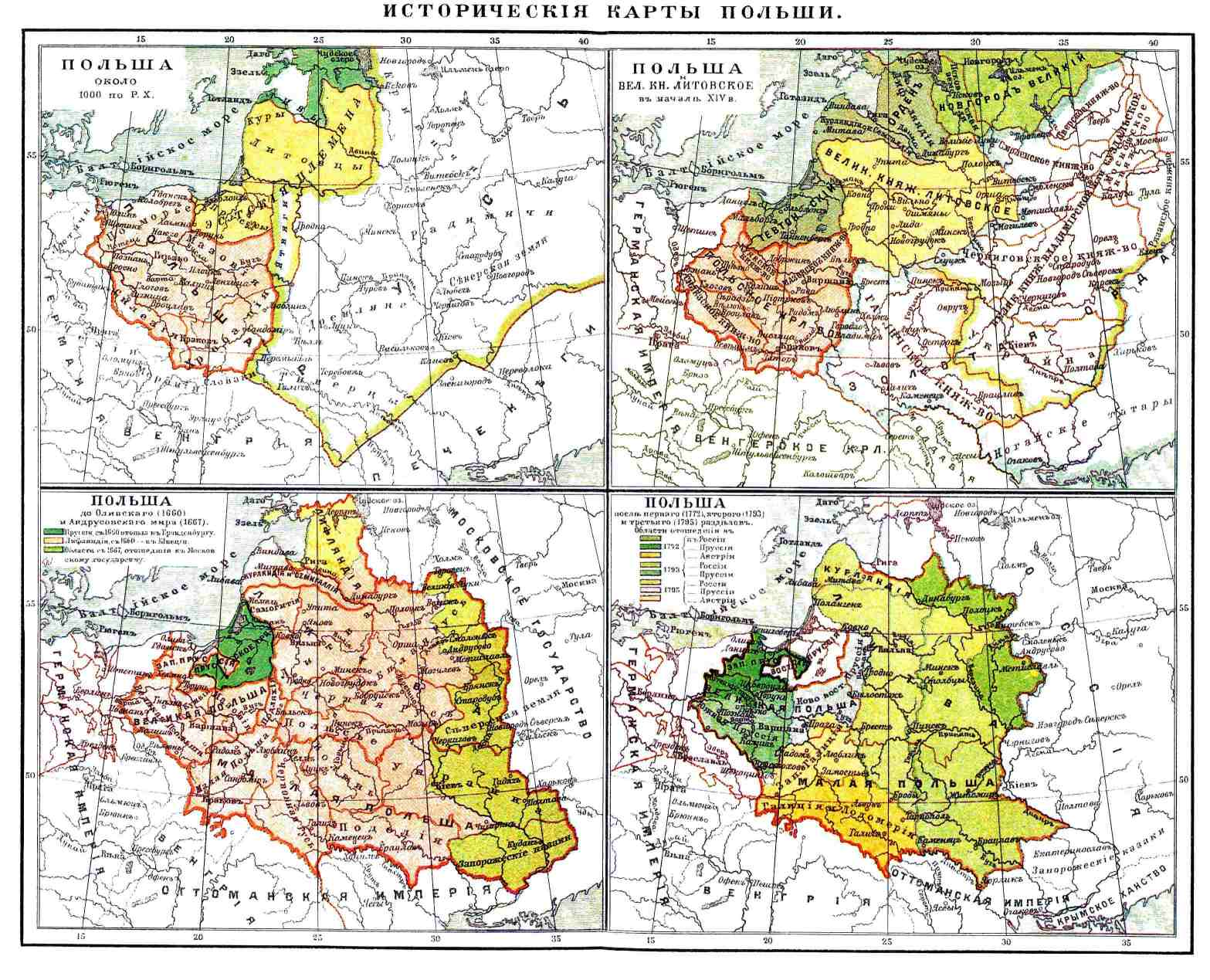 Исторические карты Польши. Иллюстрация из энциклопедии Брокгауза и Ефрона 1. Польша около 1000 после Р. Х. 2. Польша и Великое княжество Литовское в начале XIV в. 3. Польша до Оливского (1660) и Андрусовского (1667) мира. 4. Польша после первого (1772), второго (1793) и третьего (1795) разделов.